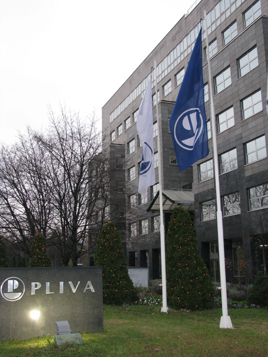 Upravna zgrada Pliva d.d. u Zagrebu